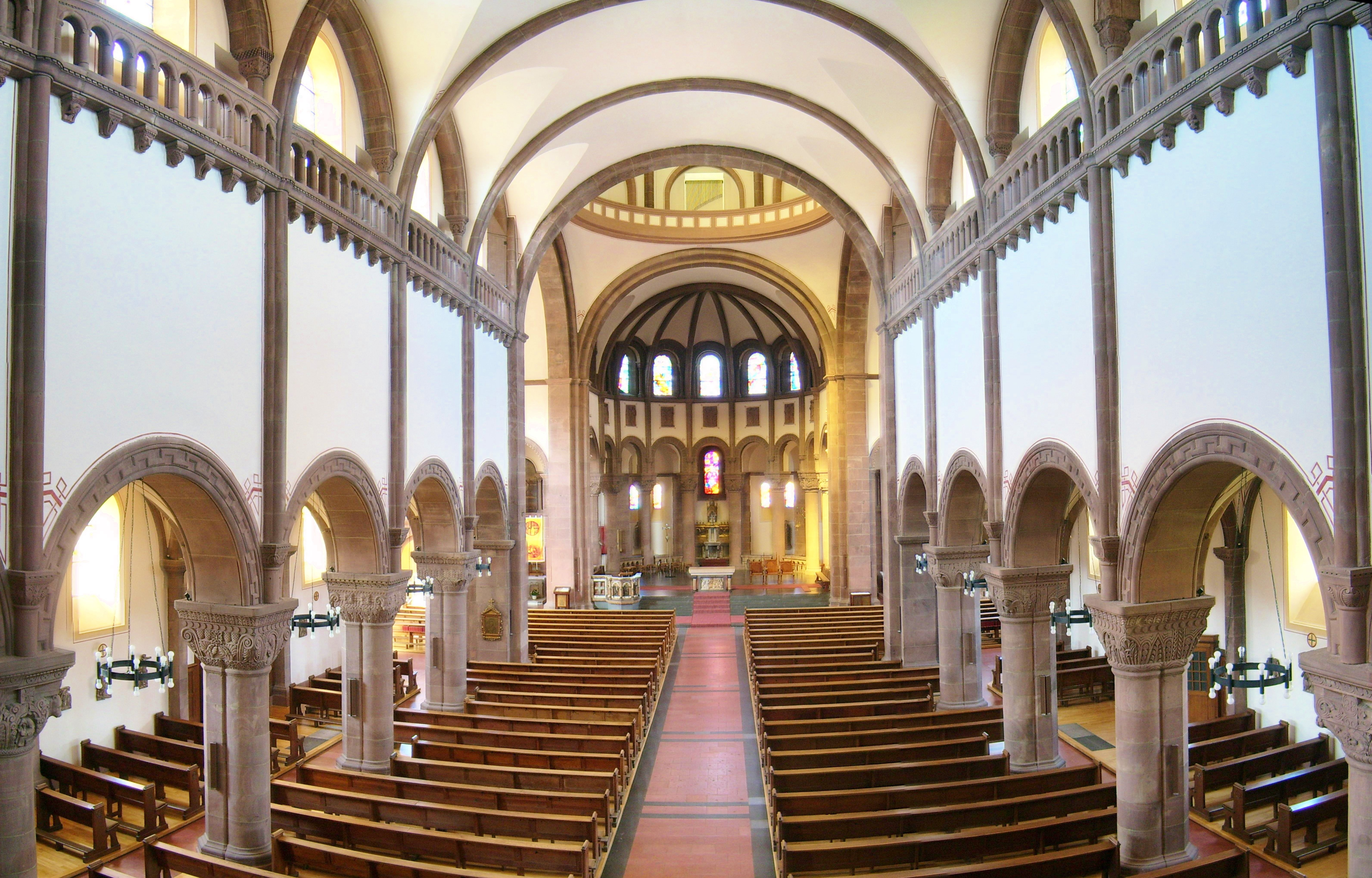 Saardom innen Panorama